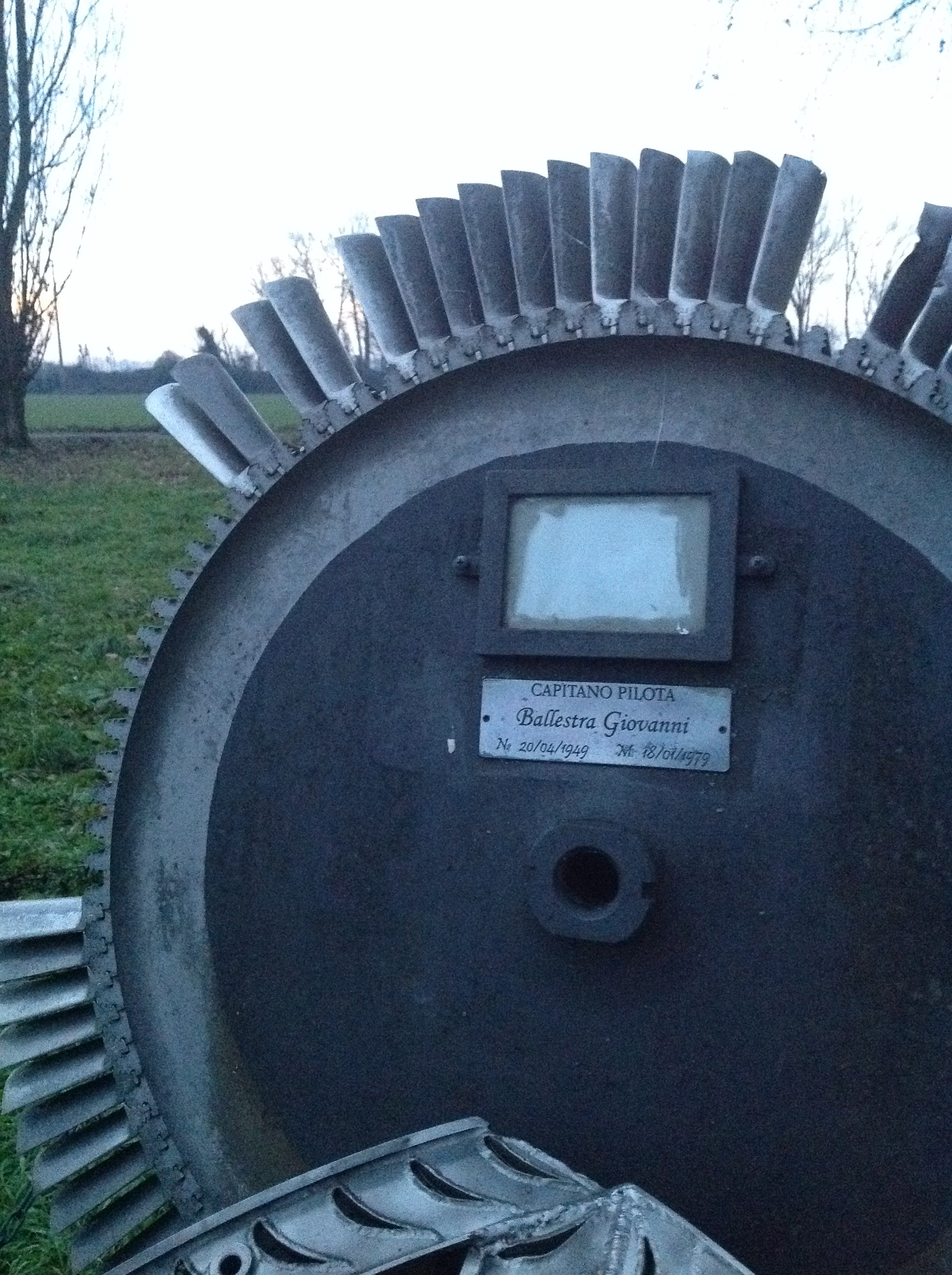 Dettaglio dove si legge il nome del pilota caduto